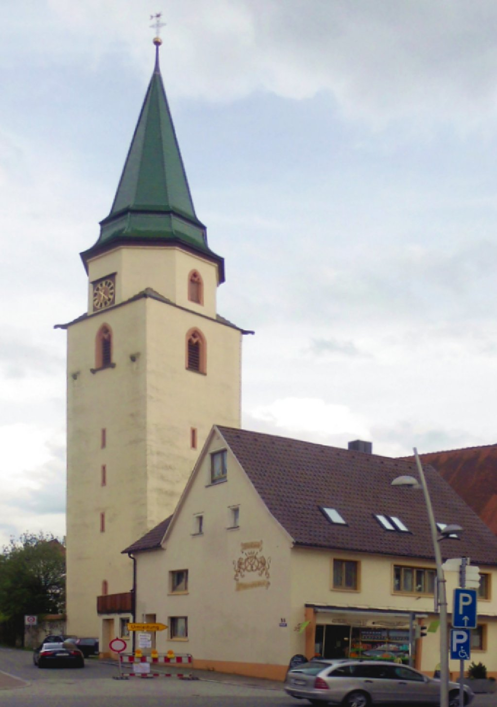 Turm der Stadtkirche St. Verena und Gallus in Hüfingen